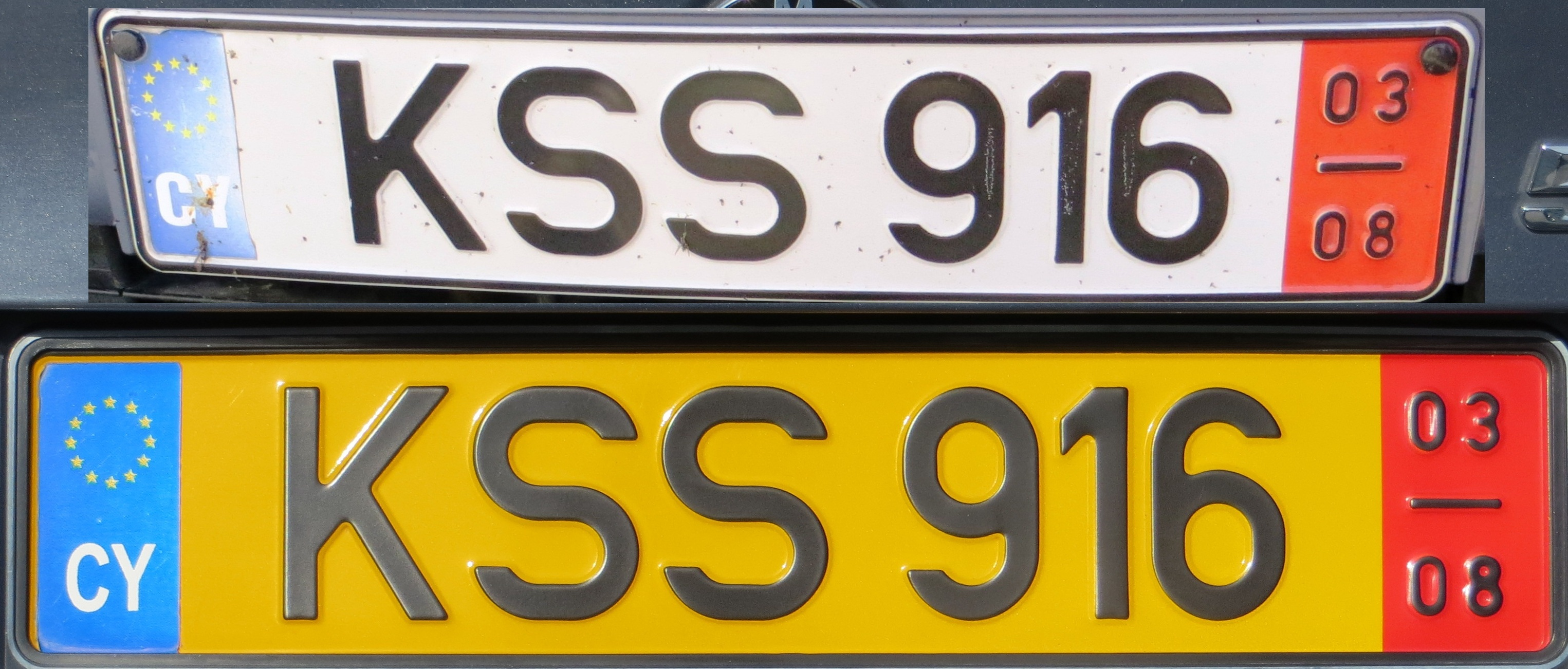 Cyprus tijdelijke plaat